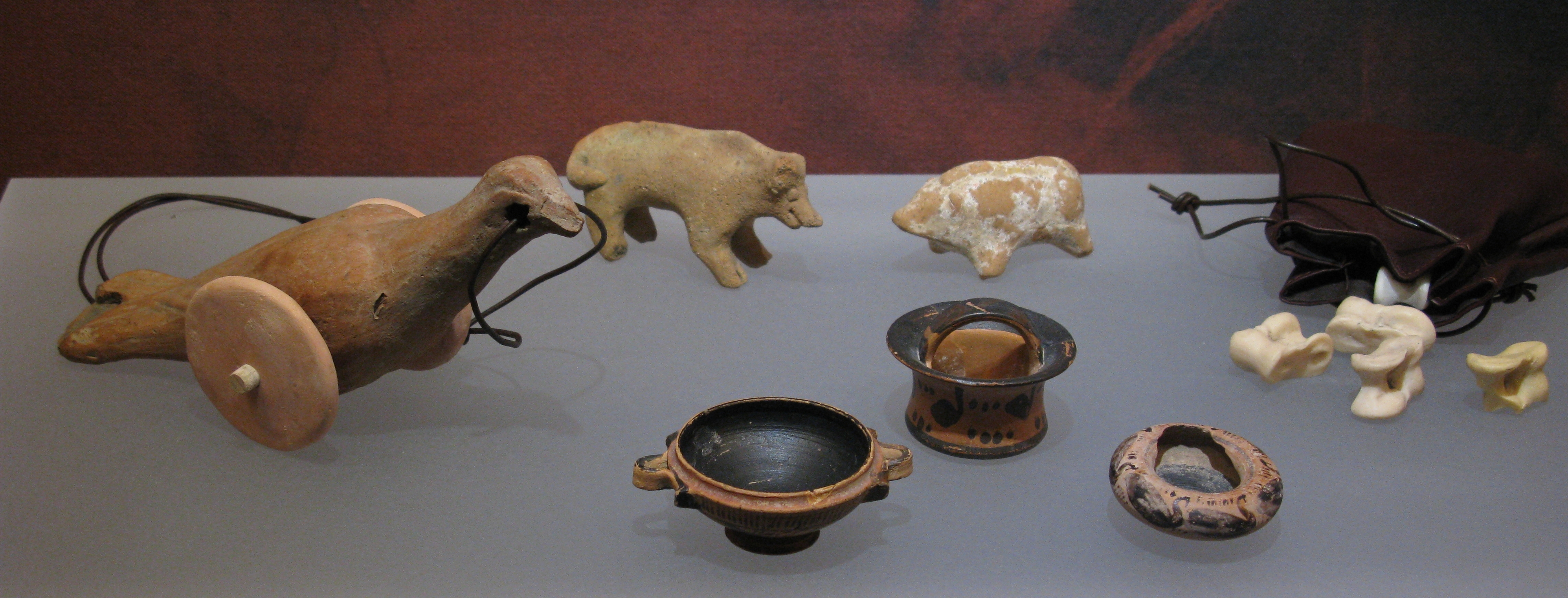 Cycladic Art Museum, Athens, Greece. --- Μουσείο Κυκλαδικής Τέχνης. Αθήνα.